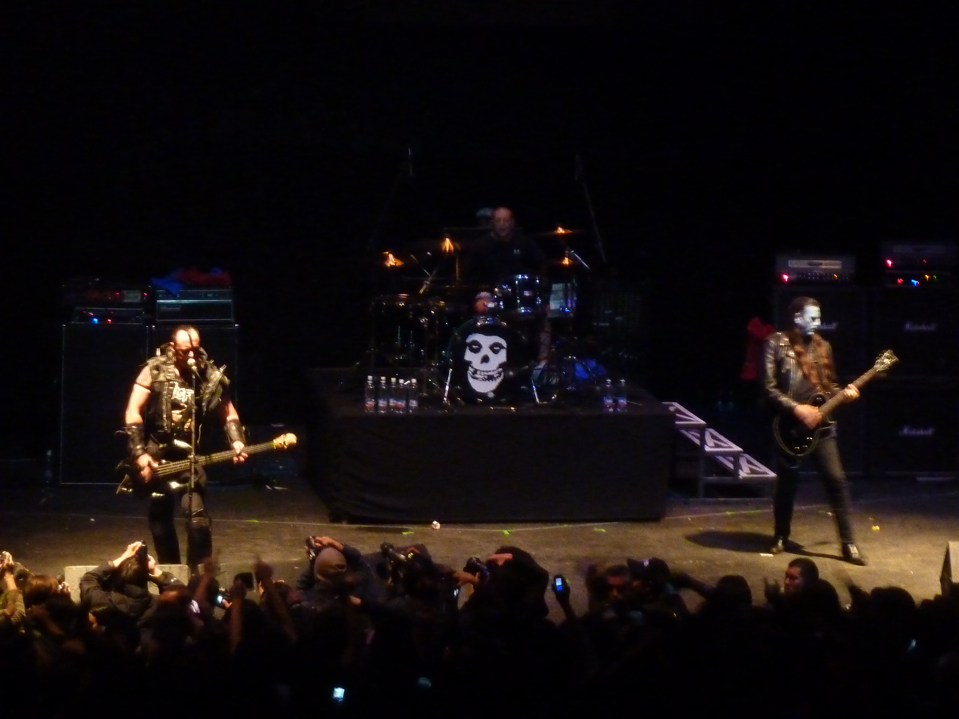 Misfits actuando en Chile en 2010.